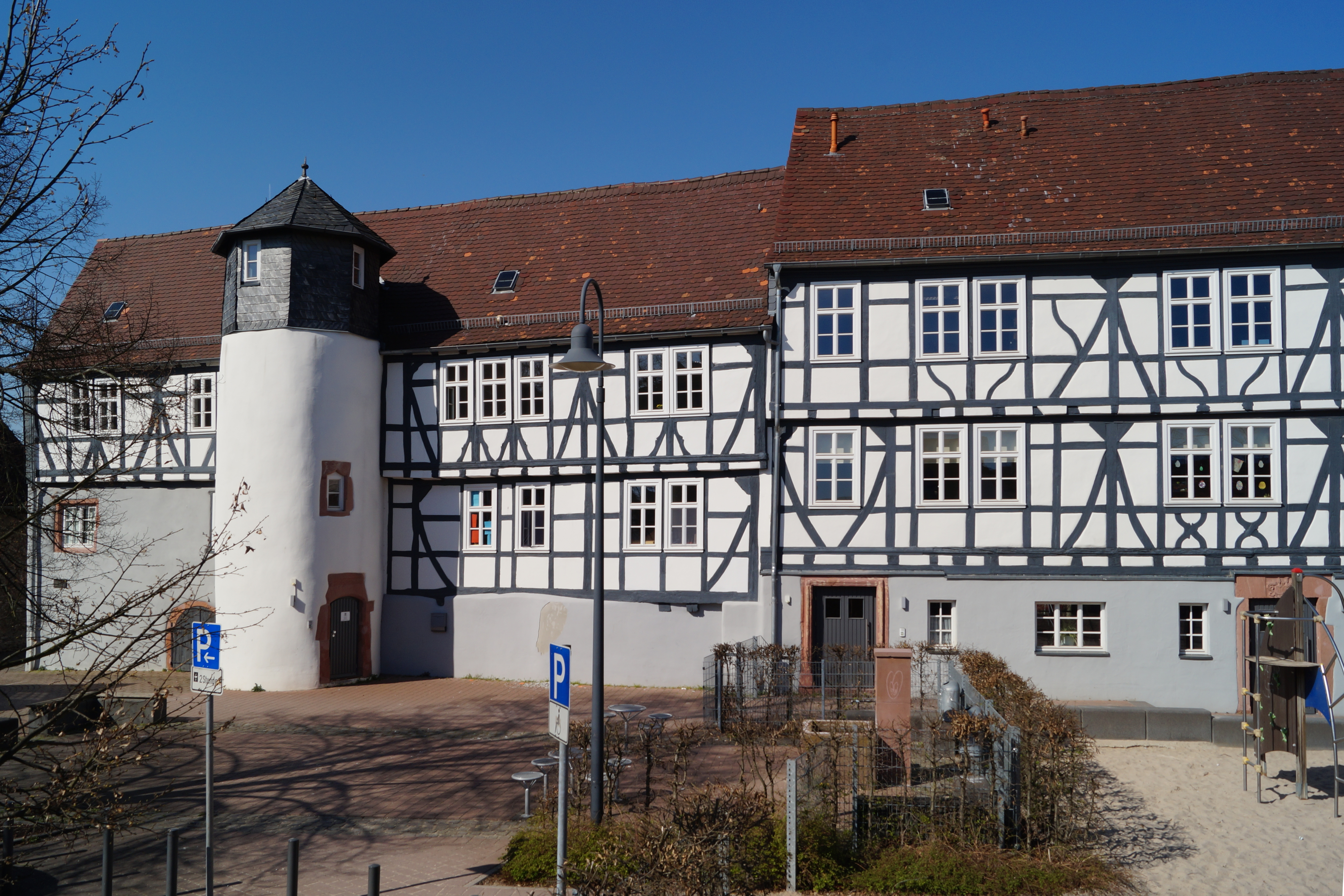 Sogenanntes Schloesschen in Rückingen, Stadt Erlensee in Hessen. Wohngebäude als Rest des ehemaligen Herrenhofs, Ansicht von der ehemaligen Hofseite.